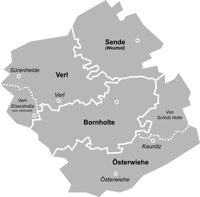 Übersichtlichere Darstellung der Verler Ortsteile und Gebiete